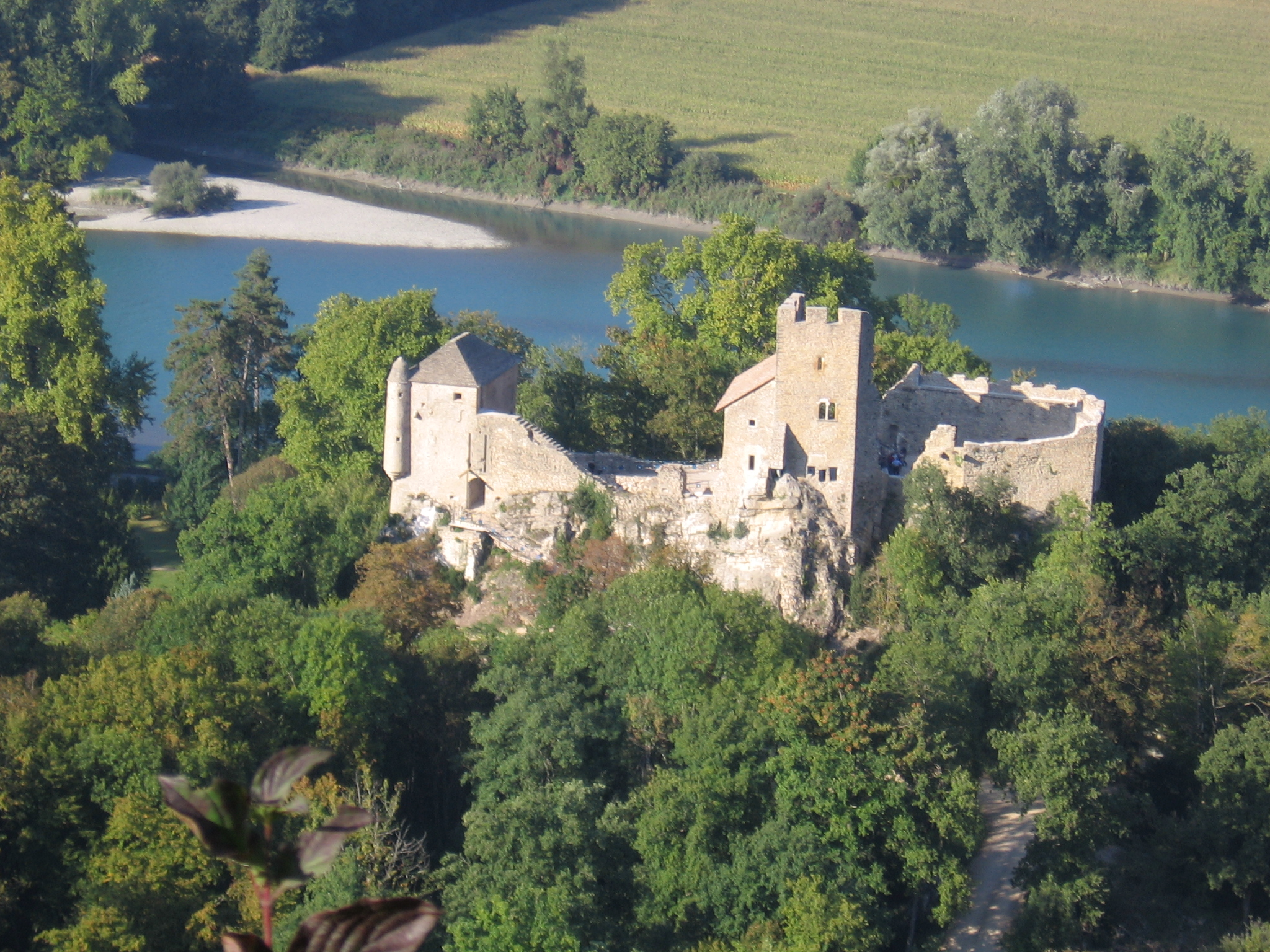 Château Vieux de Vertrieu, (InscritClassé, 19881988) .